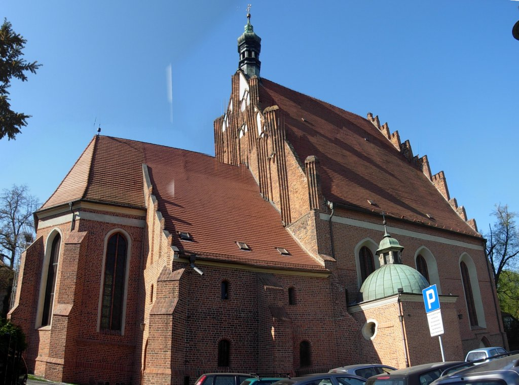 Katedra w Bydgoszczy